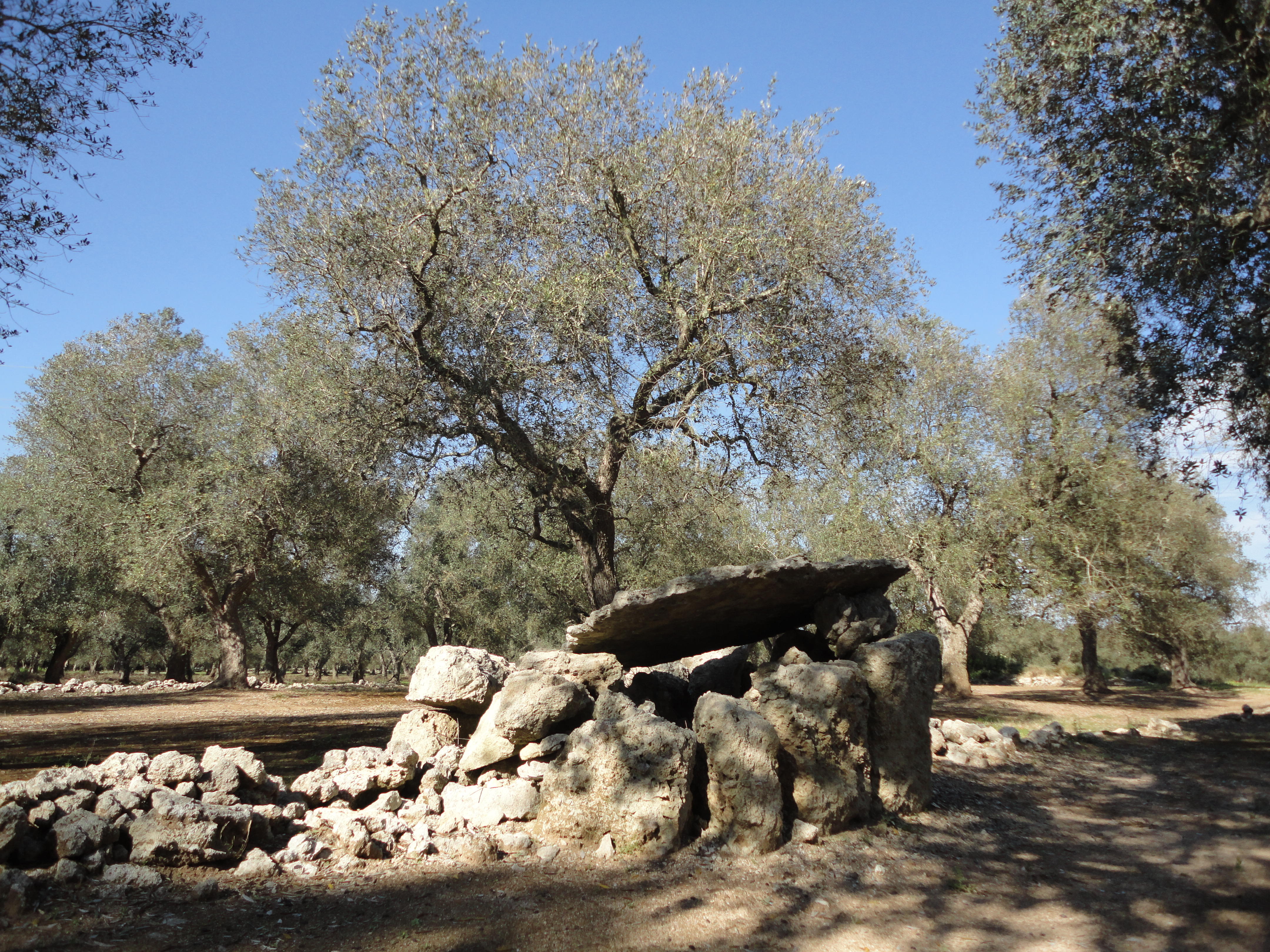 Dolmen santa Barbara Giurdignano